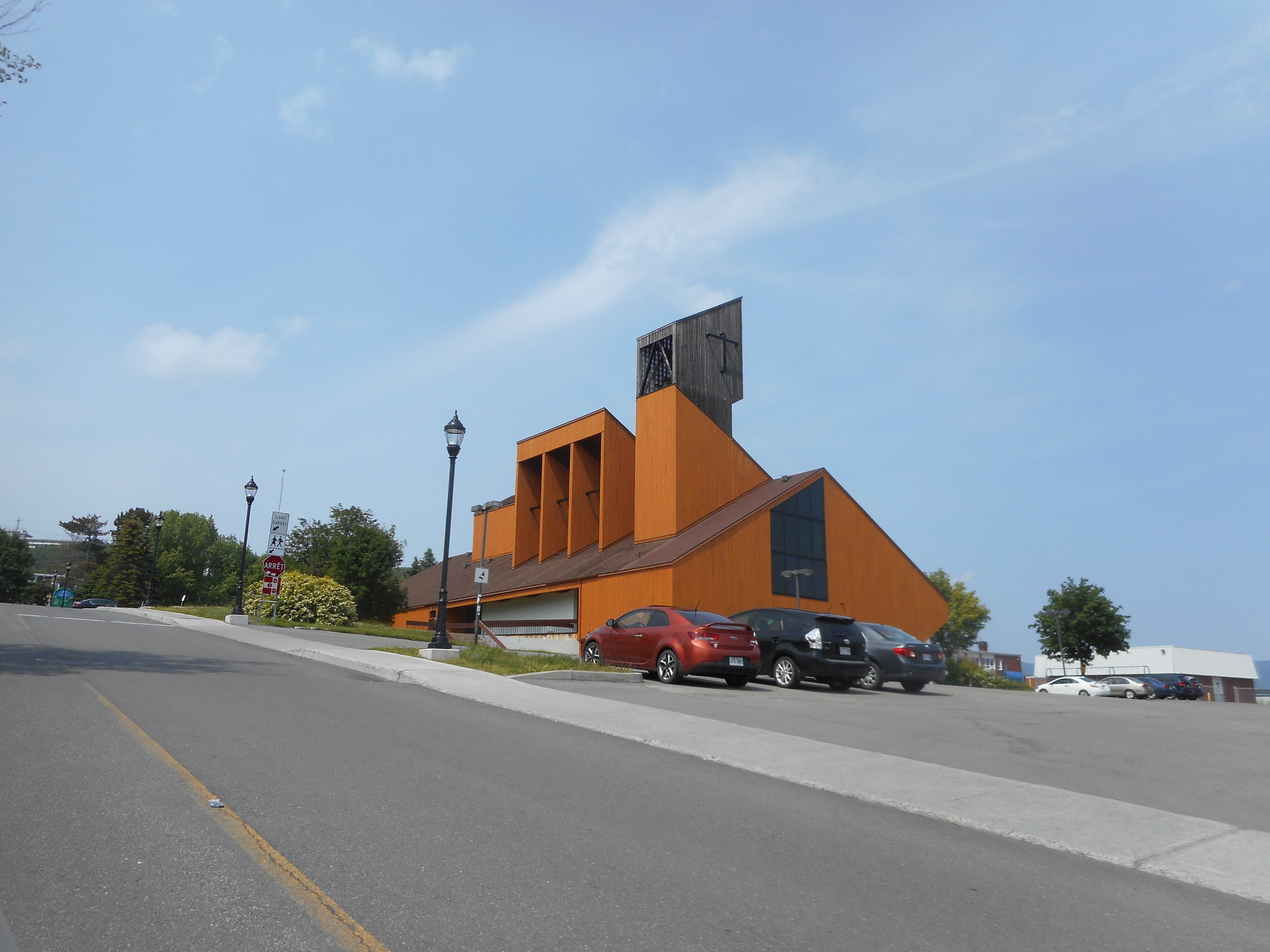 Cathédrale du Christ-Roi de Gaspé